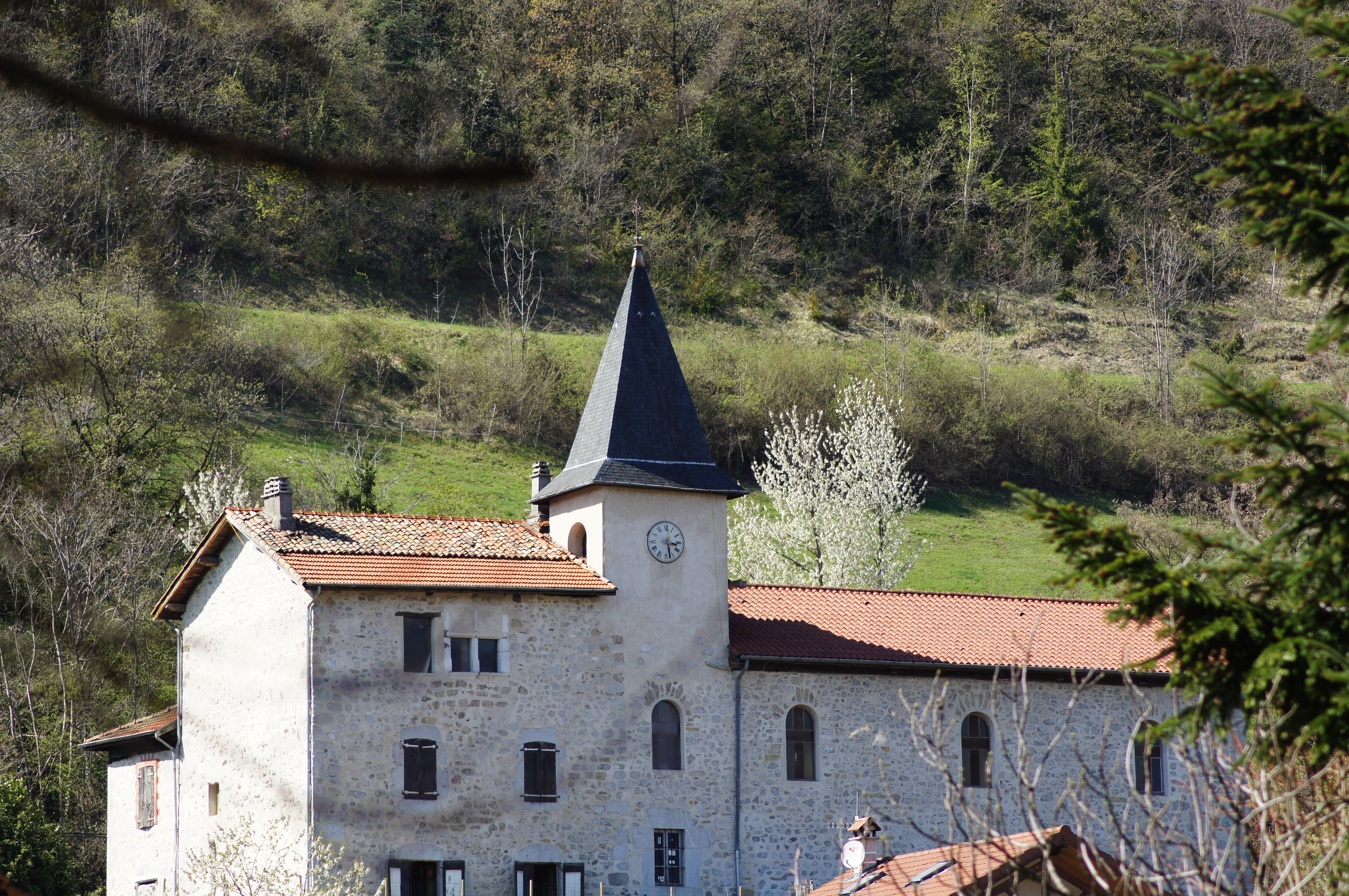 Eglise LA FLACHERE